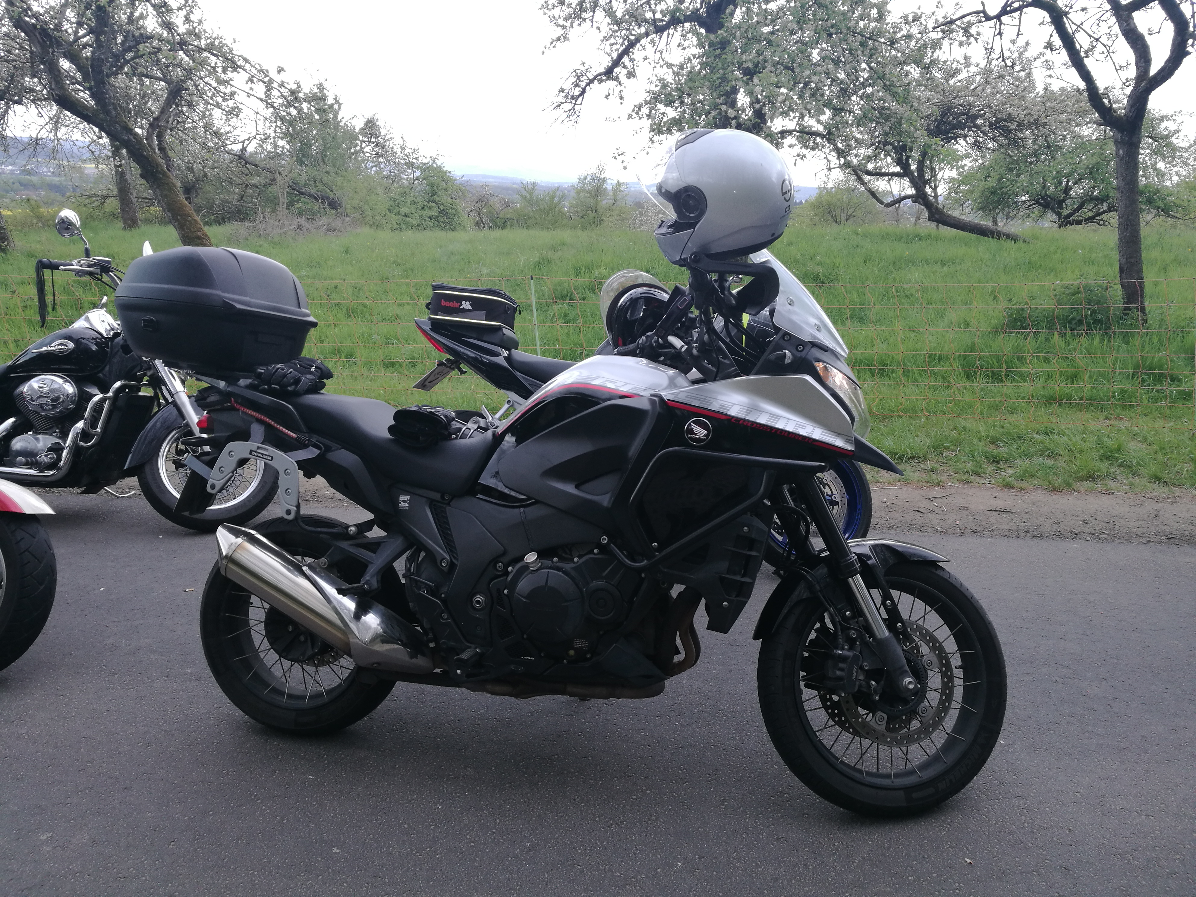 Motorrad